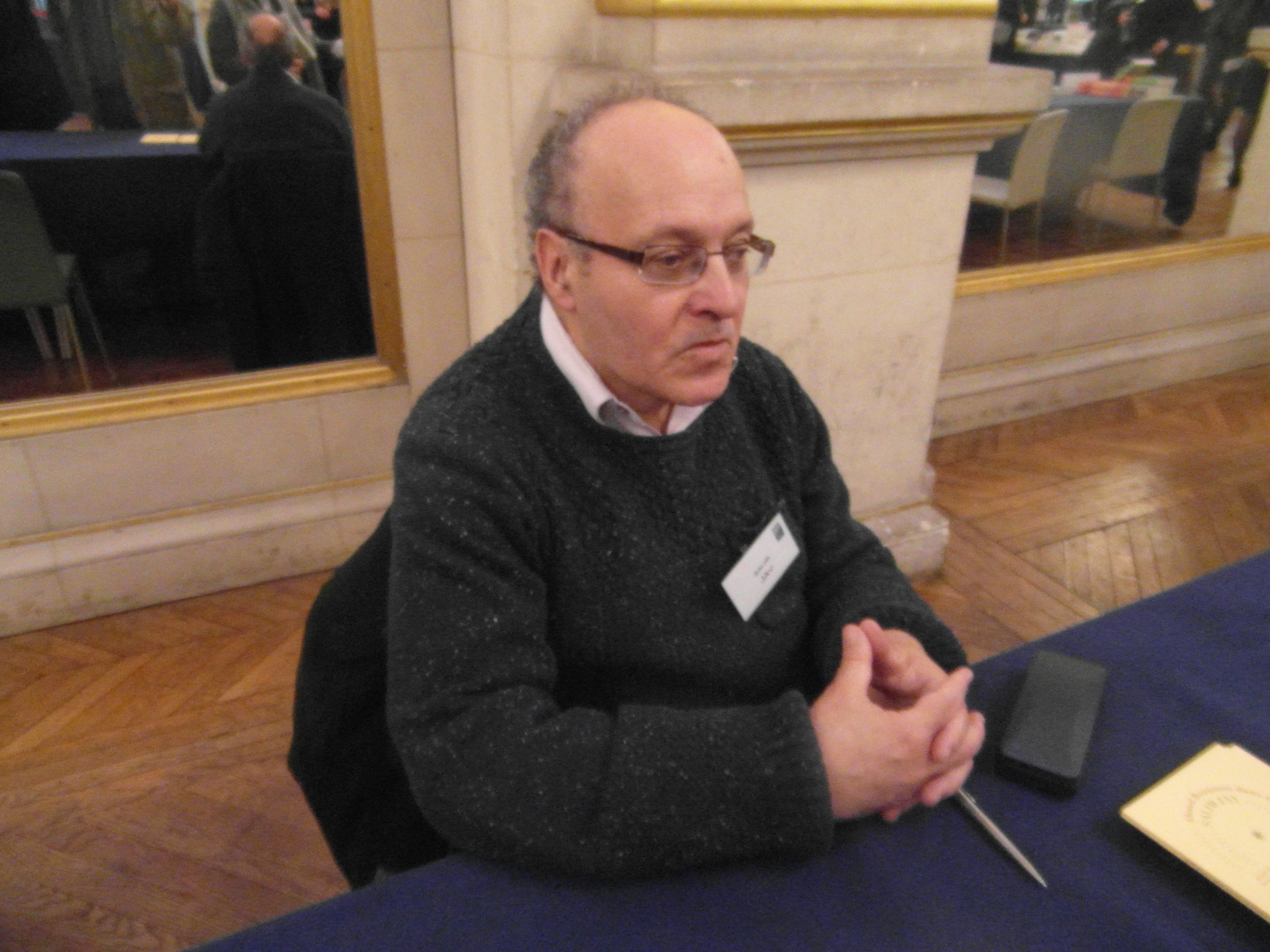 22e Maghreb des Livres, 13 et 14 février 2016